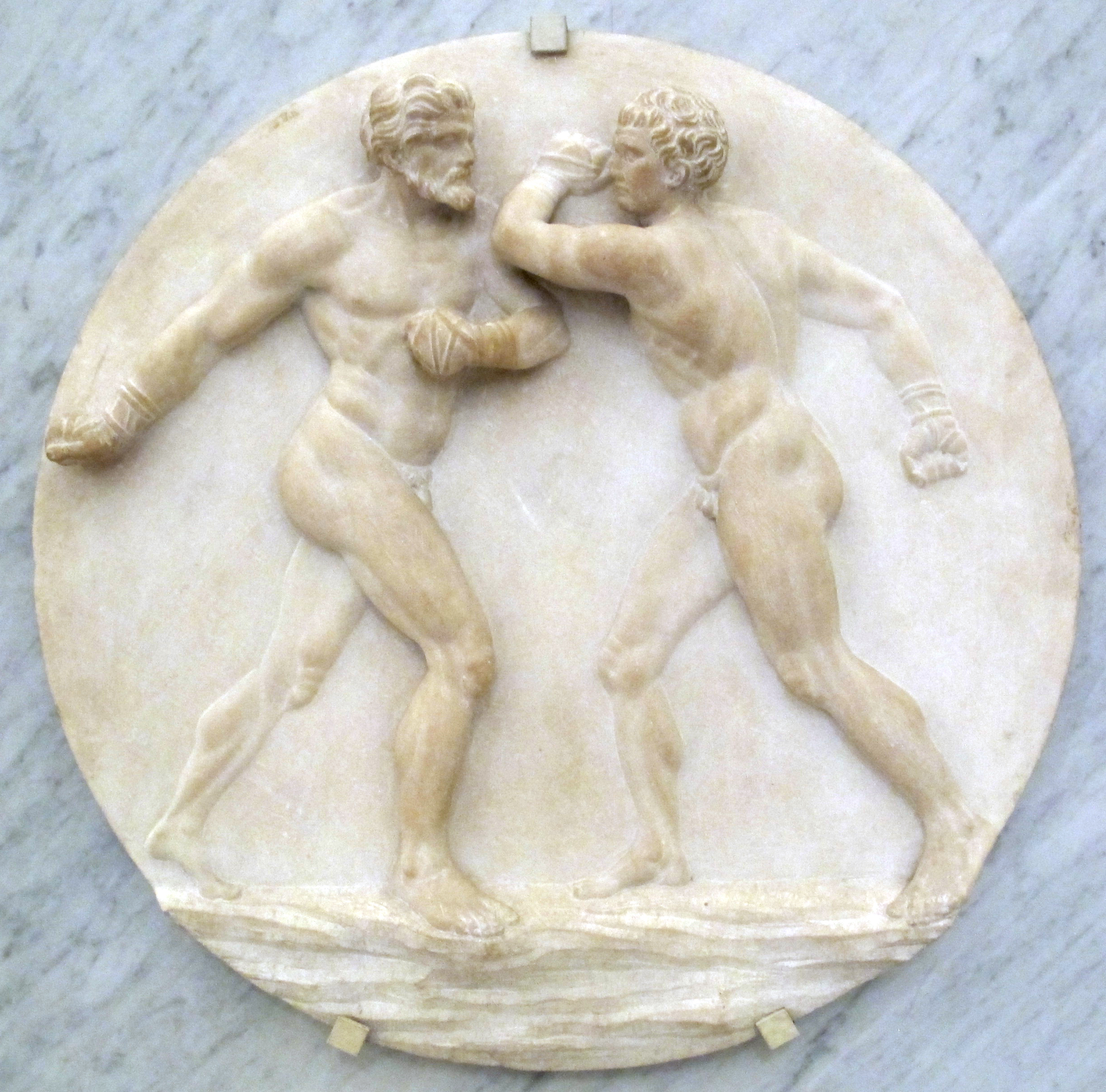 scultura italiana al Louvre